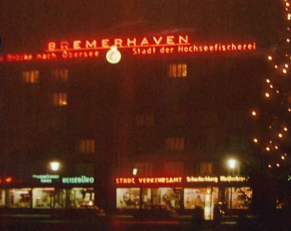 Fotografie der Stadtreklame gegenüber vom Bremerhavener Hauptbahnhof. Das Haus entstand erst zu Beginn der 1950er. Bis dahin waren dort Gärten.